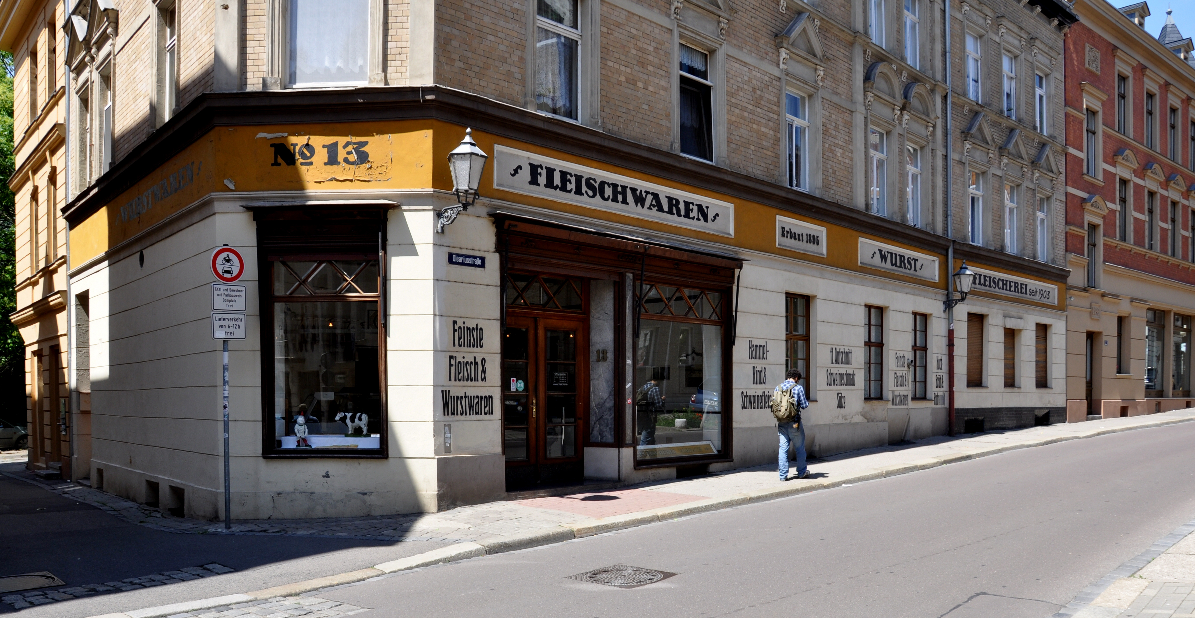 Halle (Saale), Fleischerei in der Oleariusstraße 13